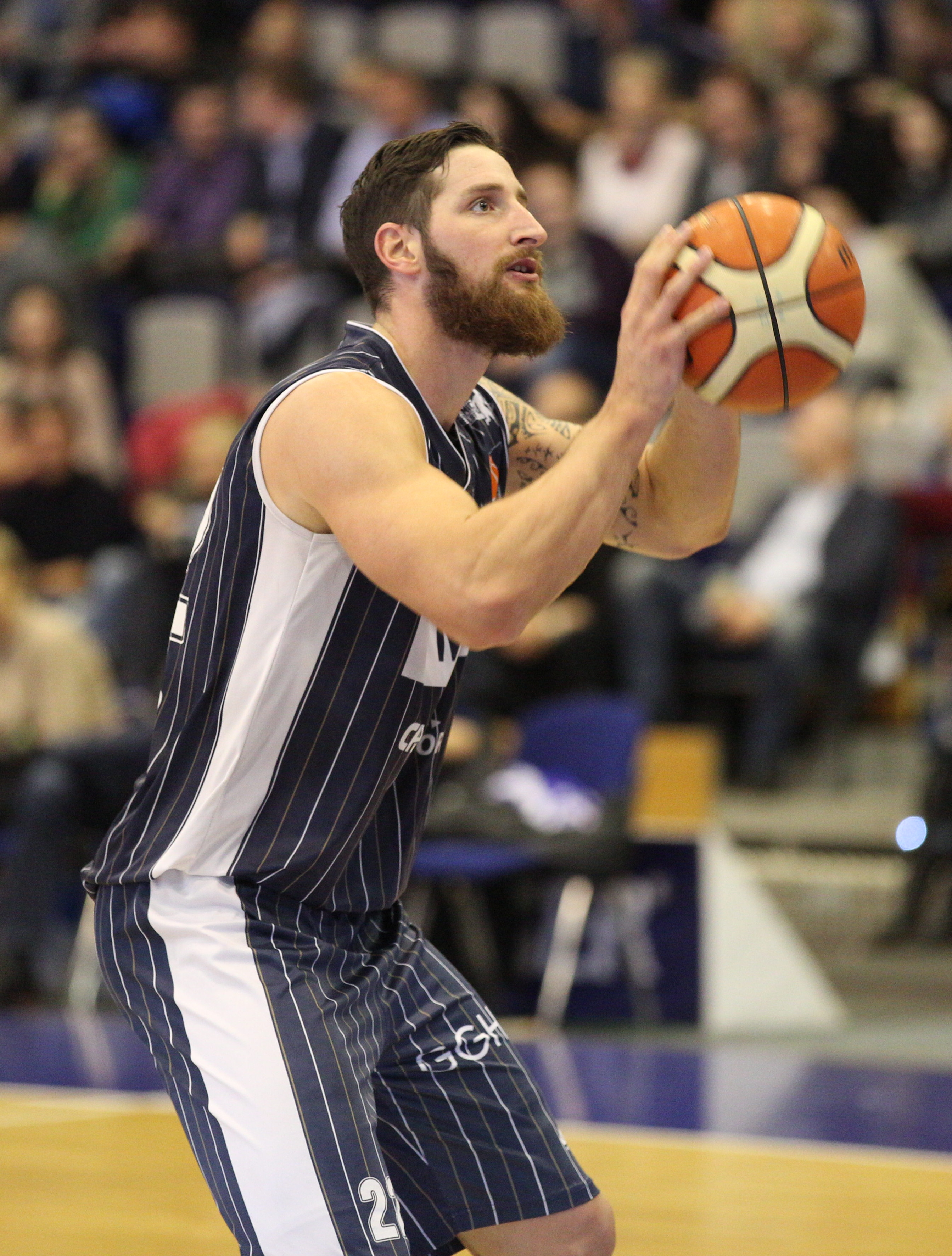 2. Basketball-Bundesliga (21. Spieltag; 2. Februar 2017; Game-ID: 102913): Phillipp Heyden (22, MLP Academics Heidelberg)